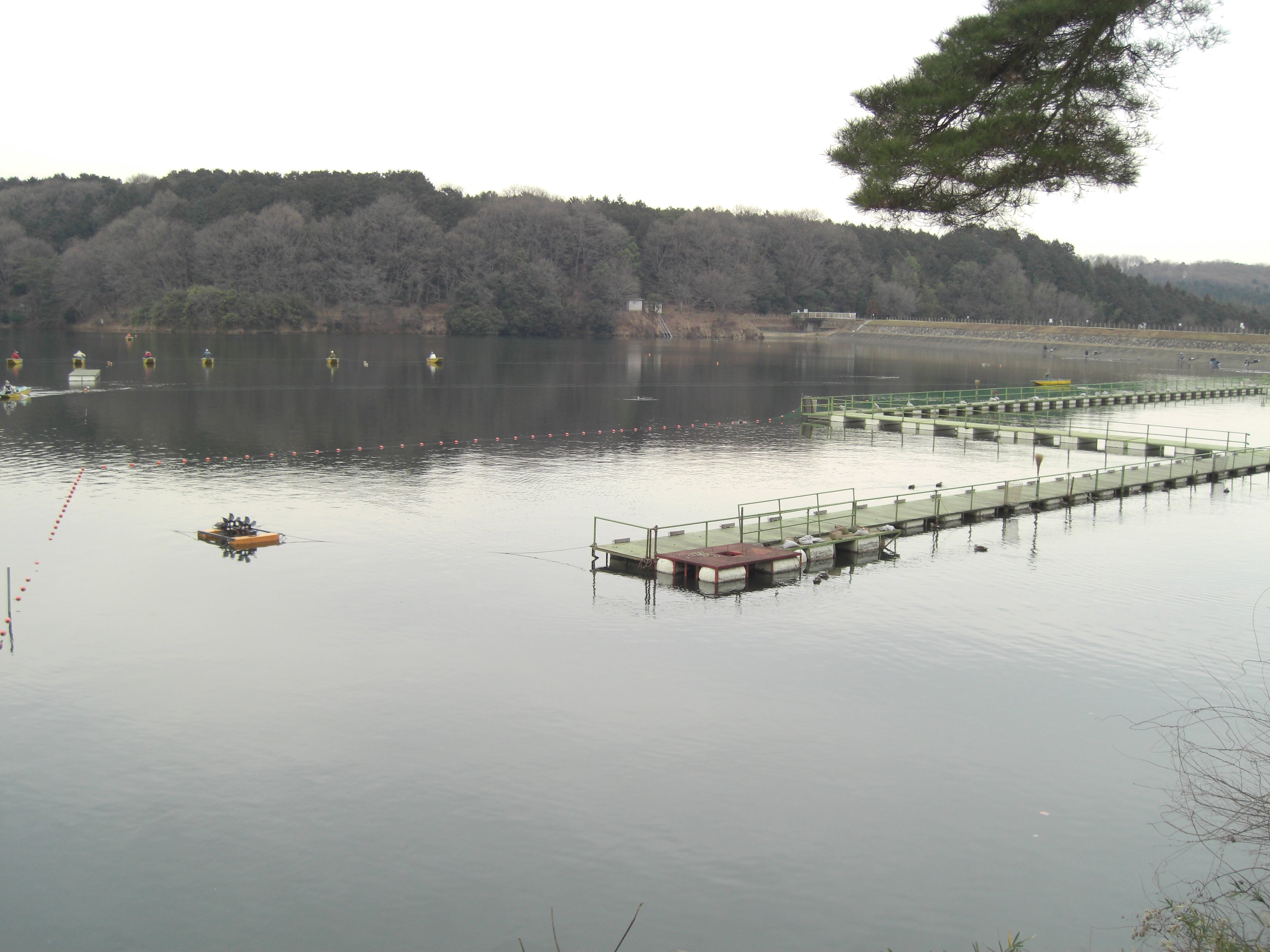 Lake Miyazawa